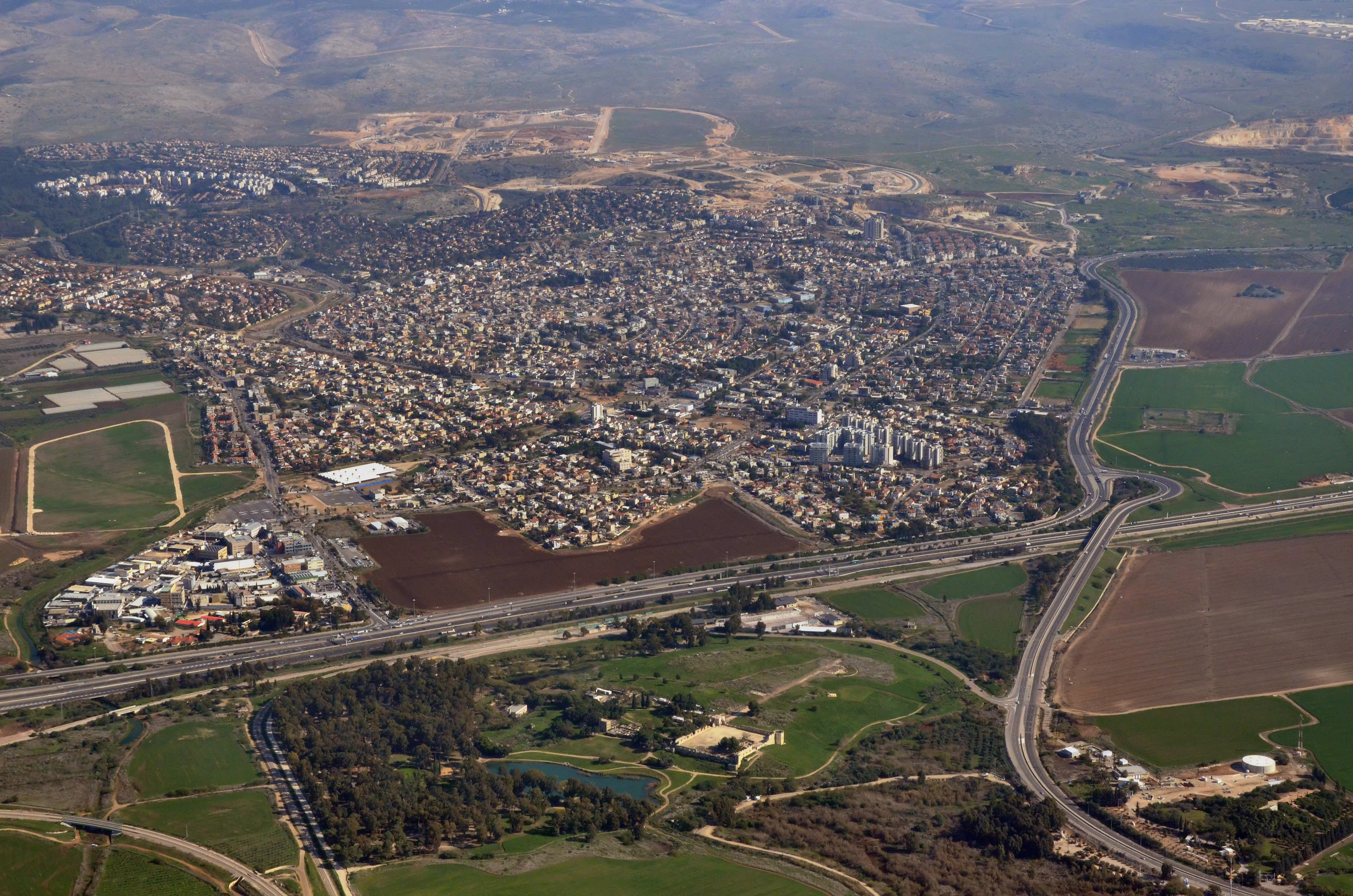 תל אפק וראש העין